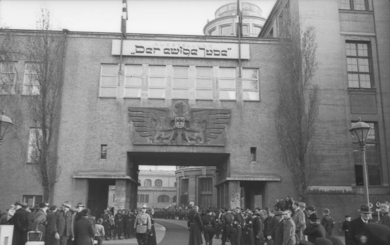 München, Ausstellung "Der ewige Jude" München.- Ausstellung "Der ewige Jude" im Deutschen Museum, 7. - 8.11.1937. Plakate an der Fassade